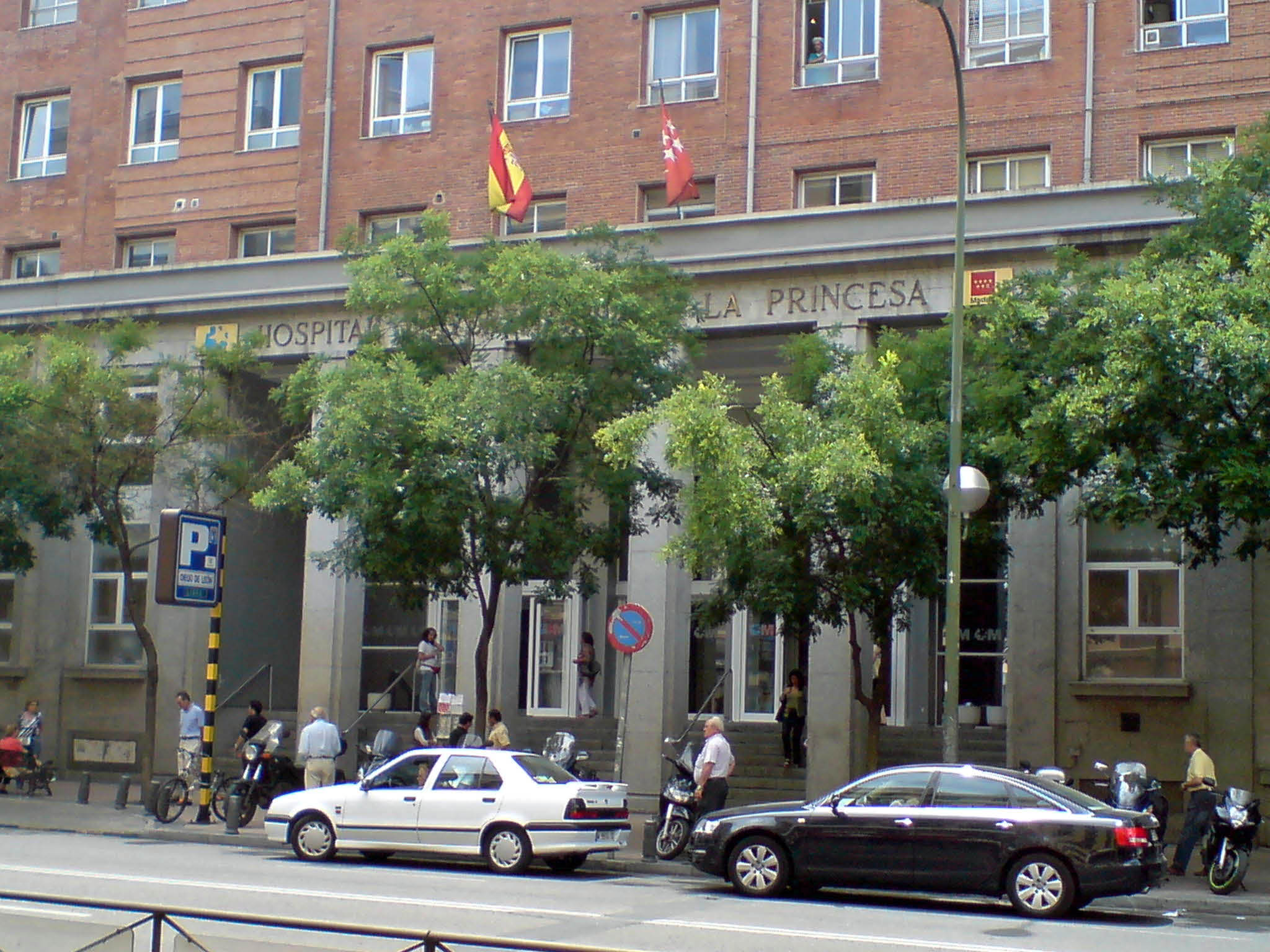 Puerta del Hospital de La Princesa, en Madrid (España).